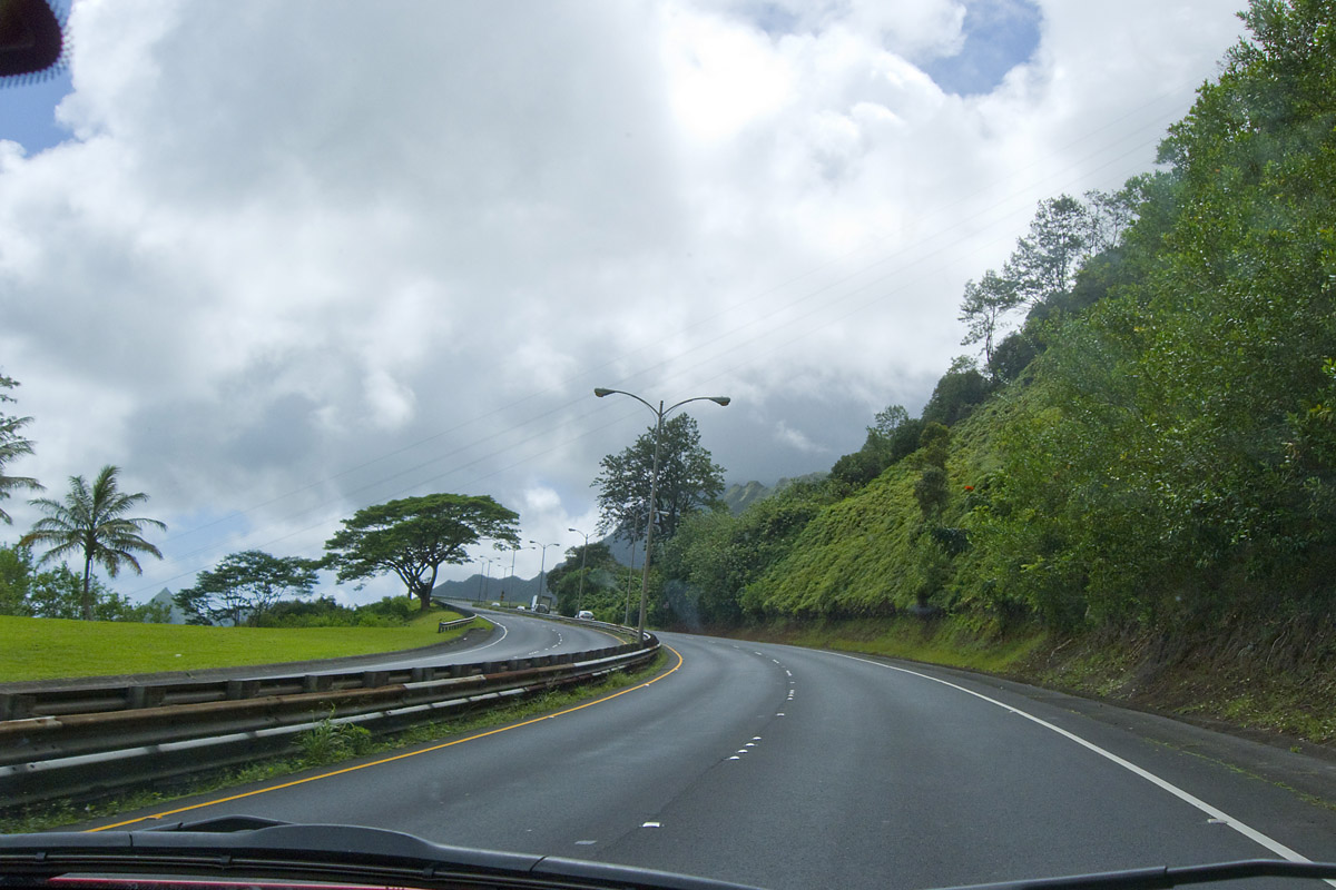 Likelike highway